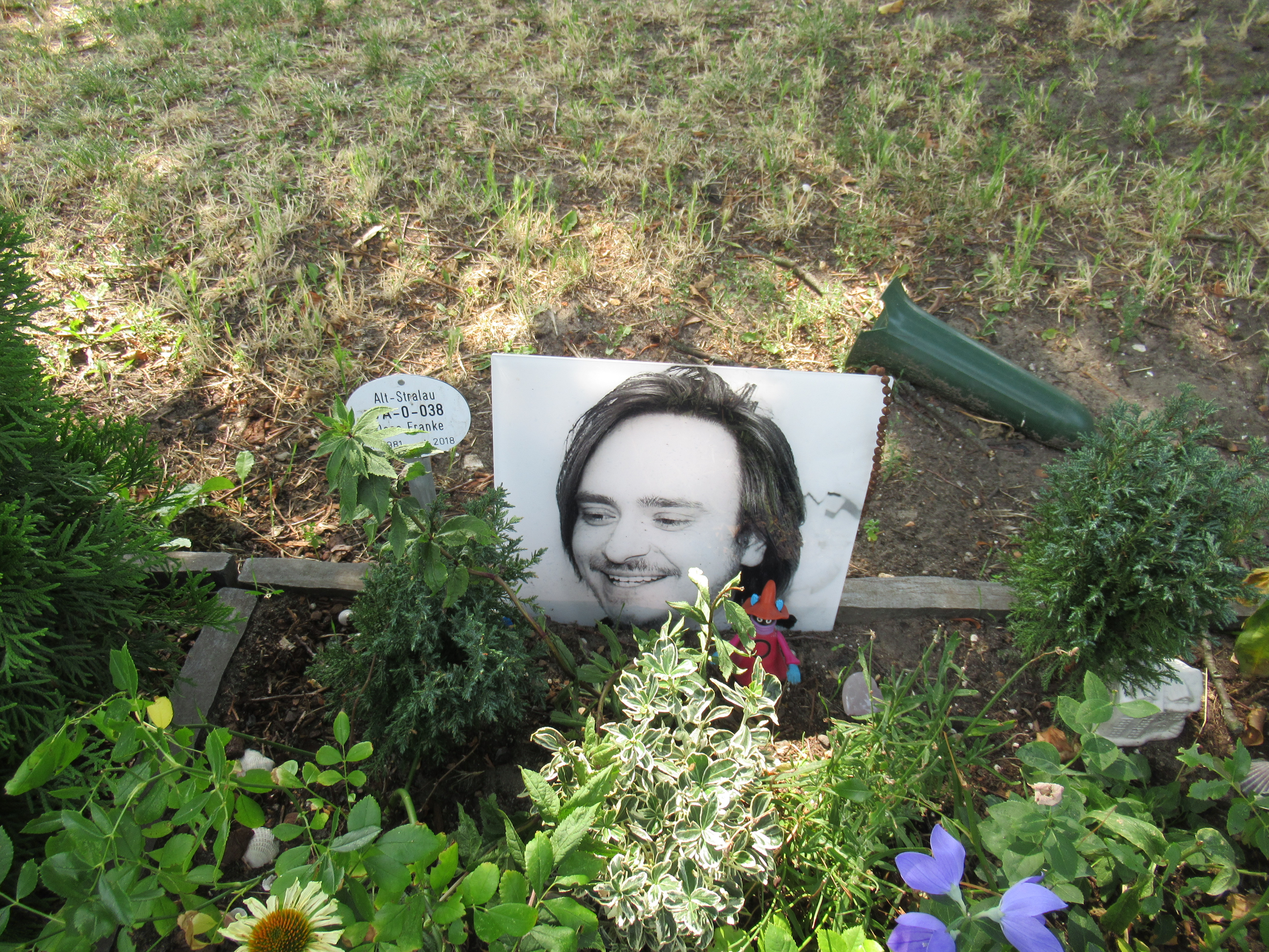 Urnengrab des DJ Daso (UA-O-038) auf dem Friedhof Stralau, Berlin-Stralau.